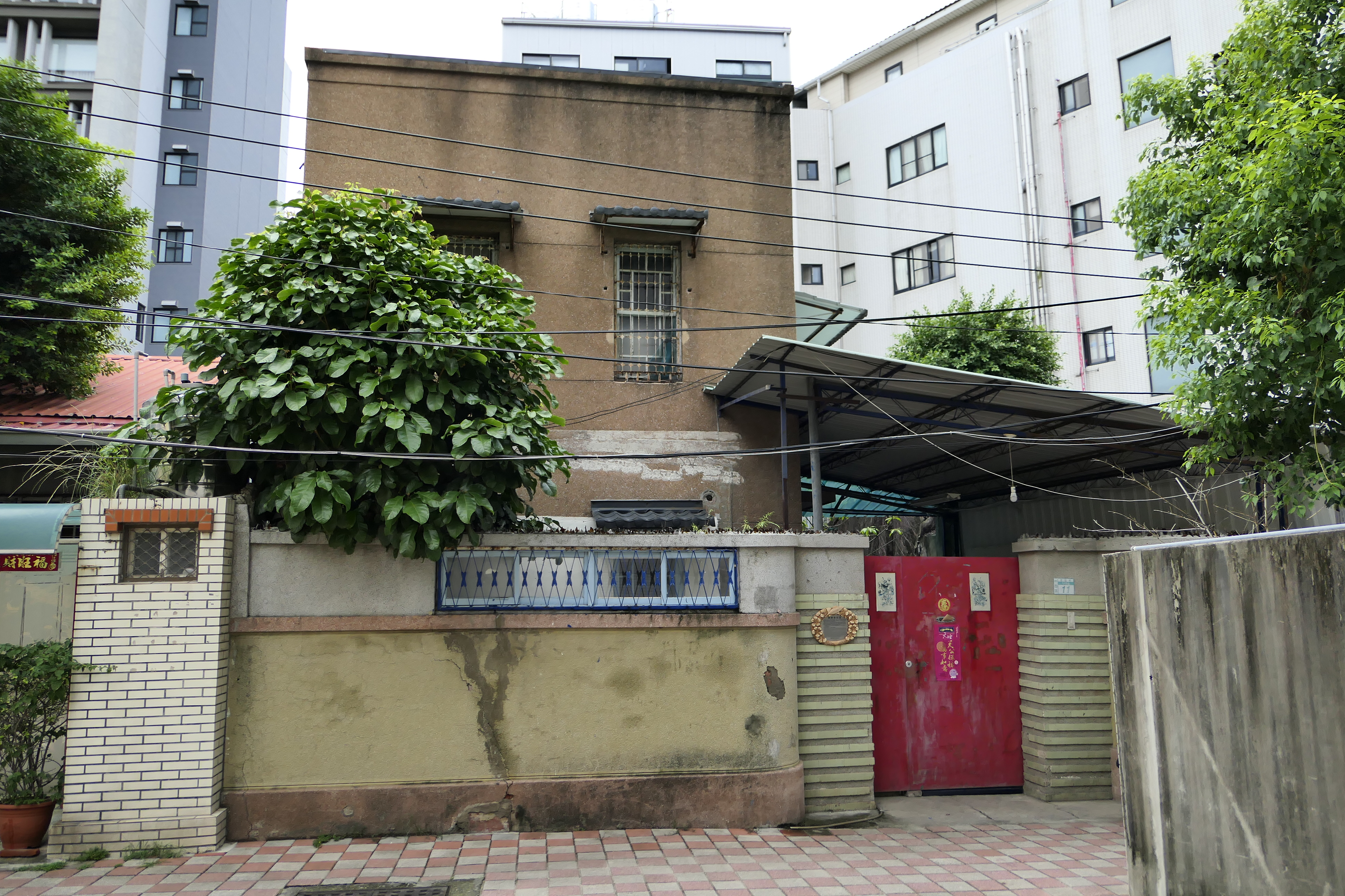 湯德章故居